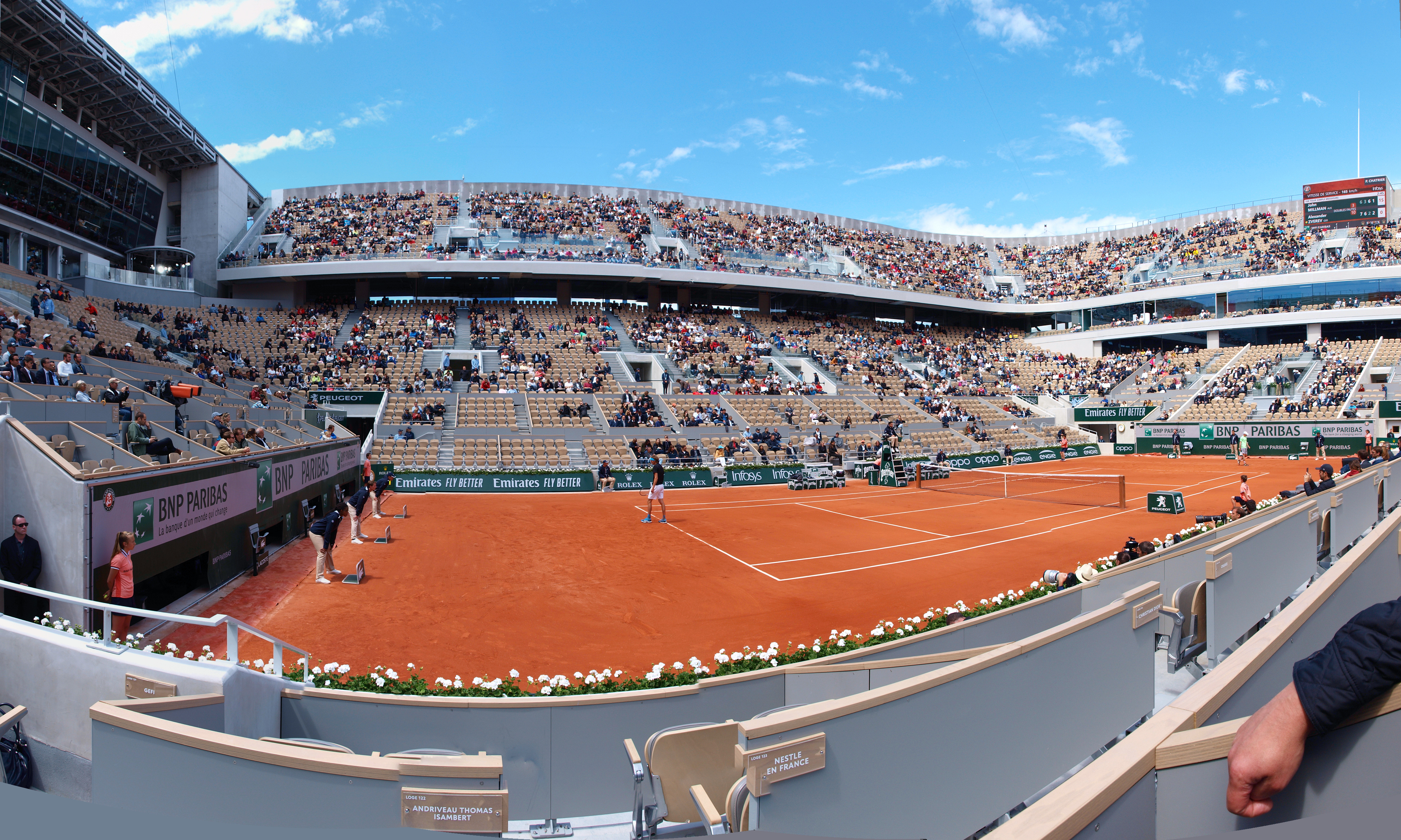 Sur le court Chatrier du stade Roland Garros (Paris, France), le 28 mai 2019